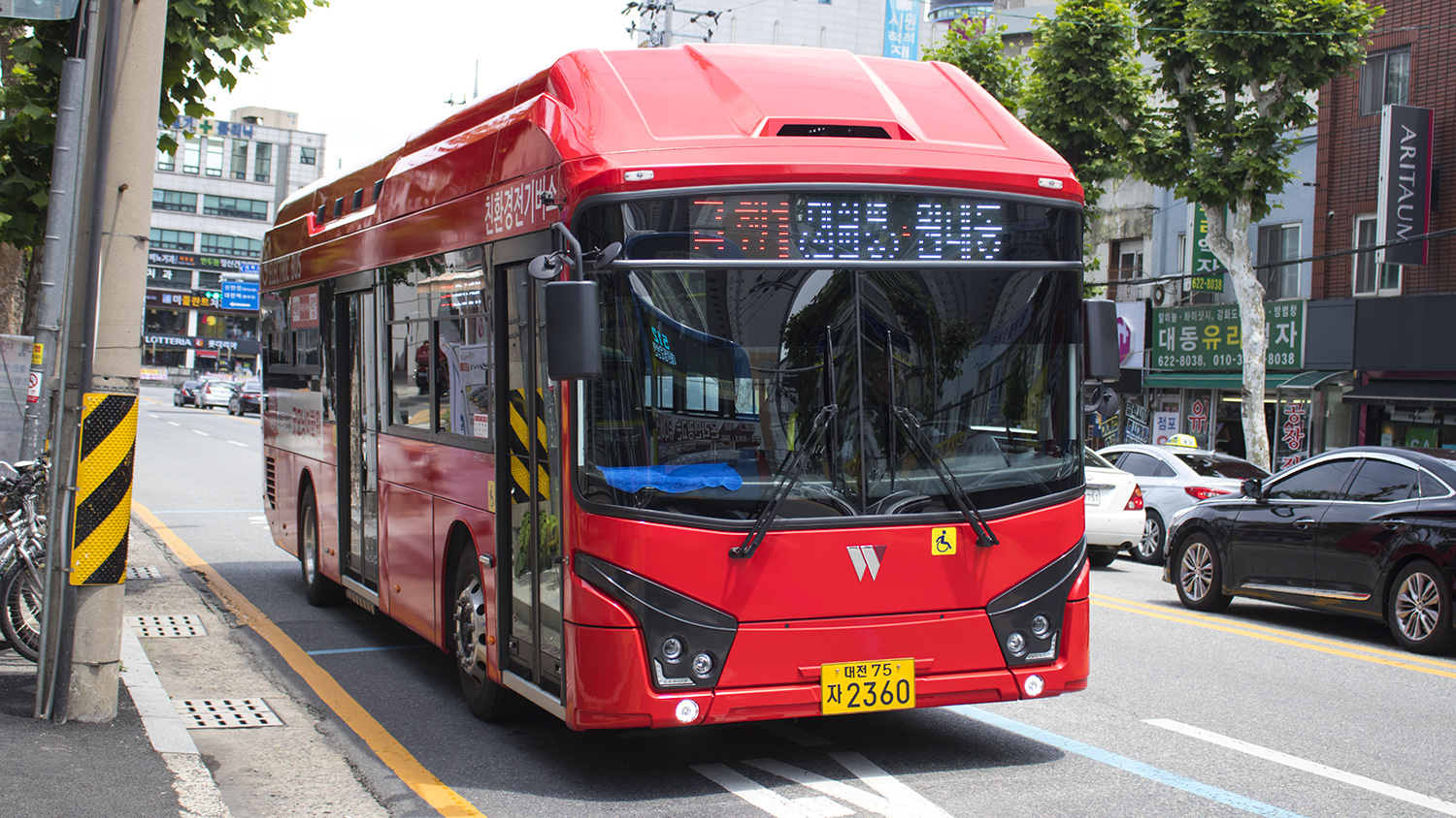 경익운수 급행1번 우진산전 아폴로 1100 전기버스